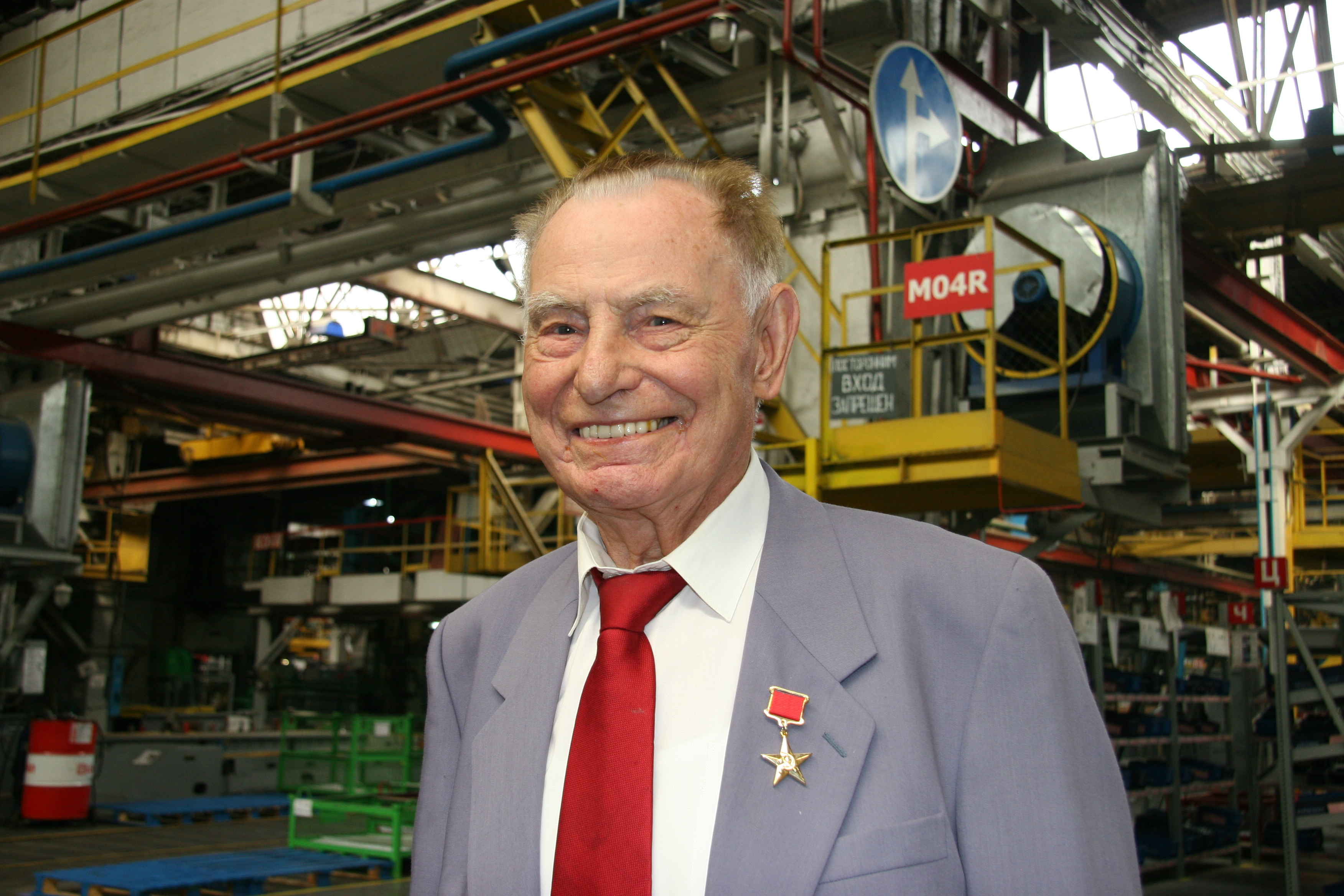 А. А. Ежевский в 2014 году.